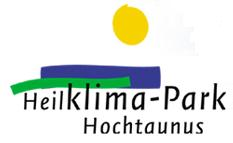 Logo Heilklimapark Hochtaunus